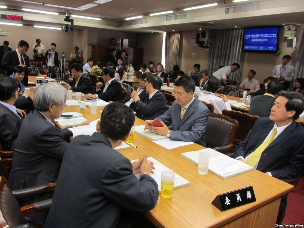 台灣執政黨國民黨立委重回立法院開會